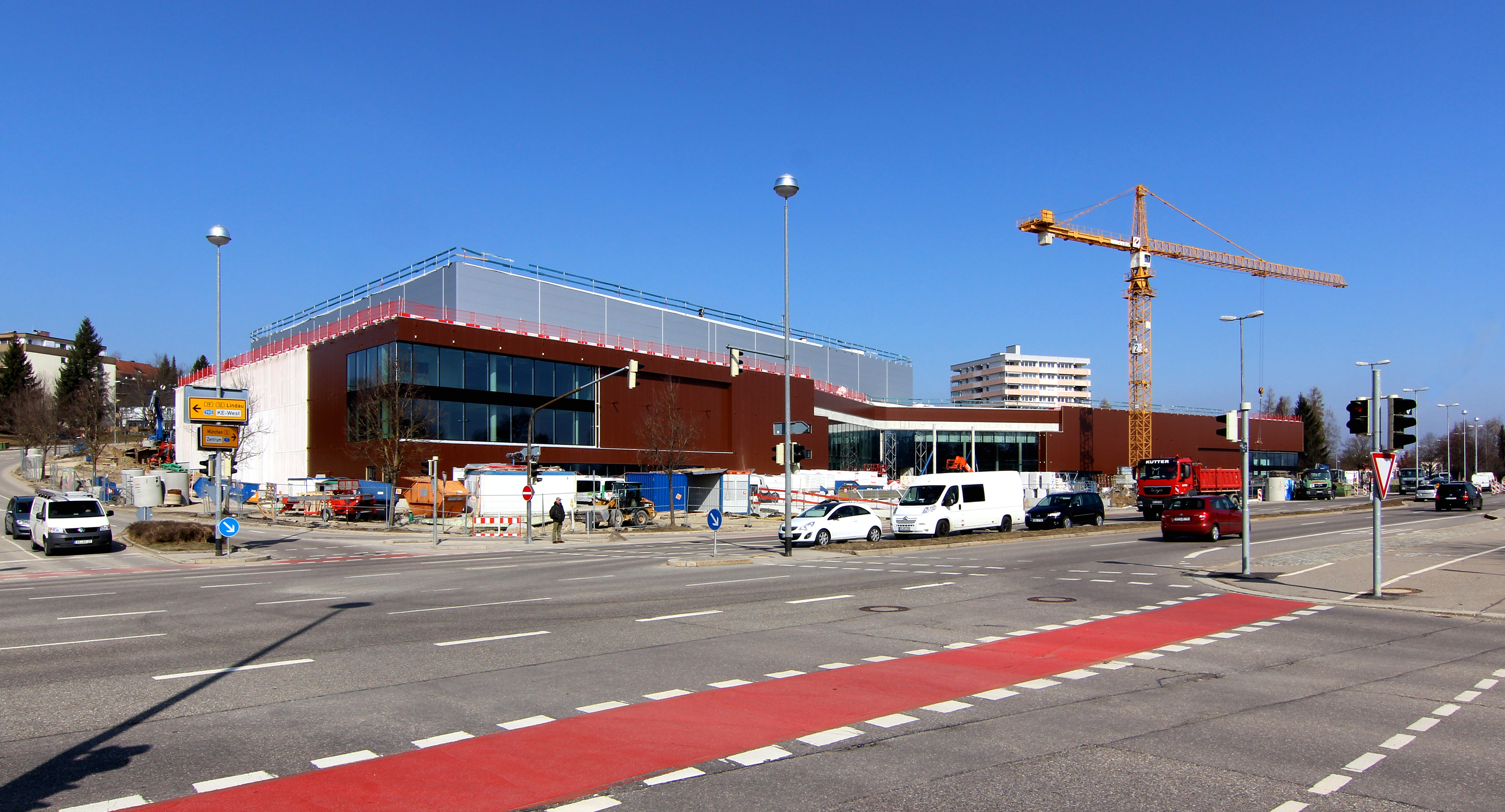 Bald fertiggesteller Bau des XXLutz in Kempten, Haslacher Berg (Nähe Hauptbahnhof)